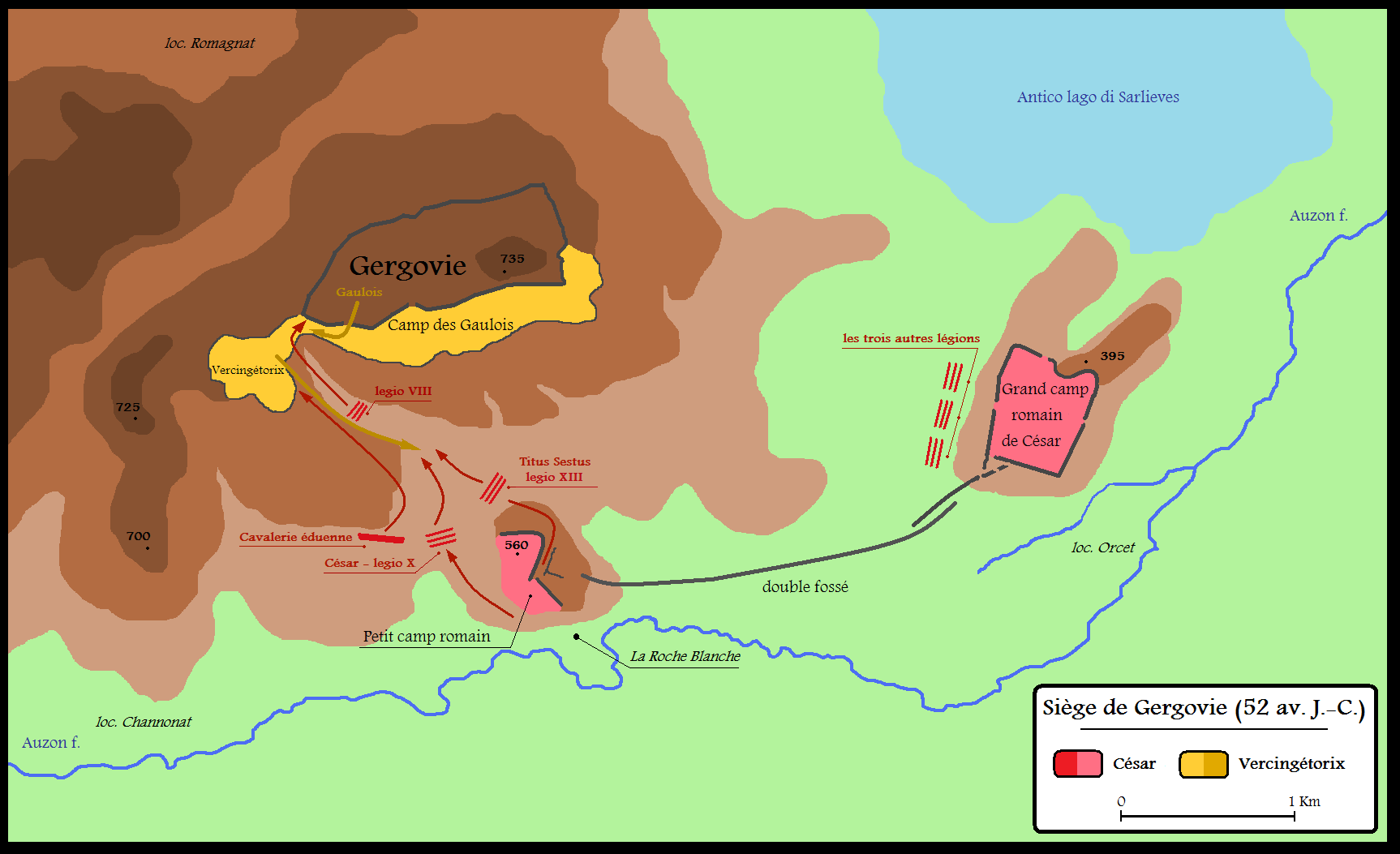 Siège de Gergovie par César contre Vercingétorix en 52 av. J.-C. (Phase 2)